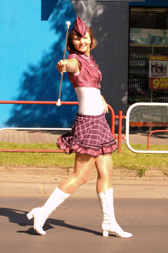 Parada orkiestr ulicą Niedurnego, otworzyła XI Międzynarodowy Festiwal Orkiestr Dętych im. Augustyna Kozioła w Rudzie Śląskiej. The parade of the orchestras openned the XI Augustyn Kozioł International Brass Orchestra Festival in Ruda Śląska.